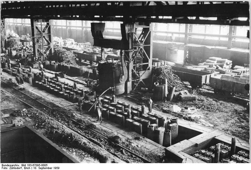 Zentralbild-Zühlsdorf We-Noa 10.9.1959 In Brandenburg begann die Stahlschlacht mit Rekorden 1882 Tonnen Stahl über den Plan hinaus haben die Stahlwerker des VEB Stahl- und Walzwerk Brandenburg in den ersten neun Septembertagen geschmolzen. Eine Rekordleistung erreichten sie am 7.9.59 mit einem Ergebnis von 556 Tonnen Stahl über den Tagesplan. Damit haben die Kollegen des Werkes einen Planvorsprung von insgesamt 22 928 Tonnen Stahl. Die Kumpel des Siemens-Martin-Ofens XI, die um den Titel "Brigade der sozialistischen Arbeit" kämpfen, haben sich zum Ziel gesetzt, bis zum 28. September 80% ihres Jahresplanes zu erfüllen. An der Drahtstrasse des Werkes kämpfen die Kollegen zur Zeit erfolgreich um die Aufholung ihrer Planrückstände. Bereits in den ersten neun Tagen des September haben sie mit 670 Tonnen Tagesplanerfüllung die höchste Leistung seit Bestehen dieser Straße erreicht. UBz: Blick in die Gießgrube während eines Stahlgusses."